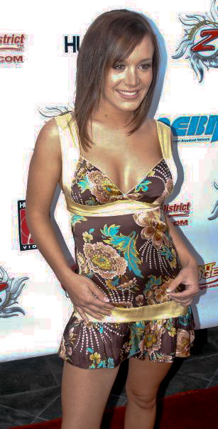 Jaclyn Case